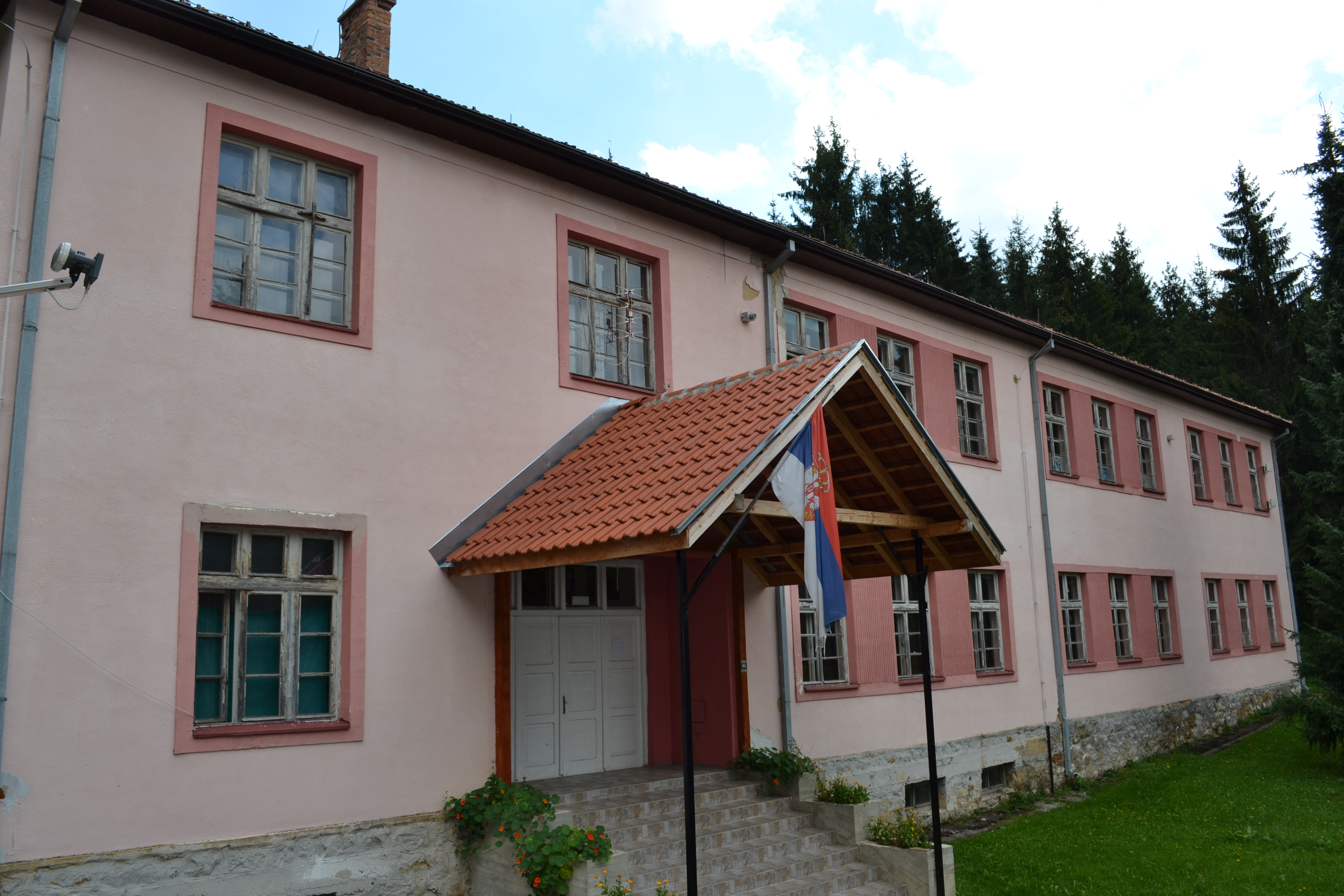 OŠ Milan Vučićević Zverac Bratljevo